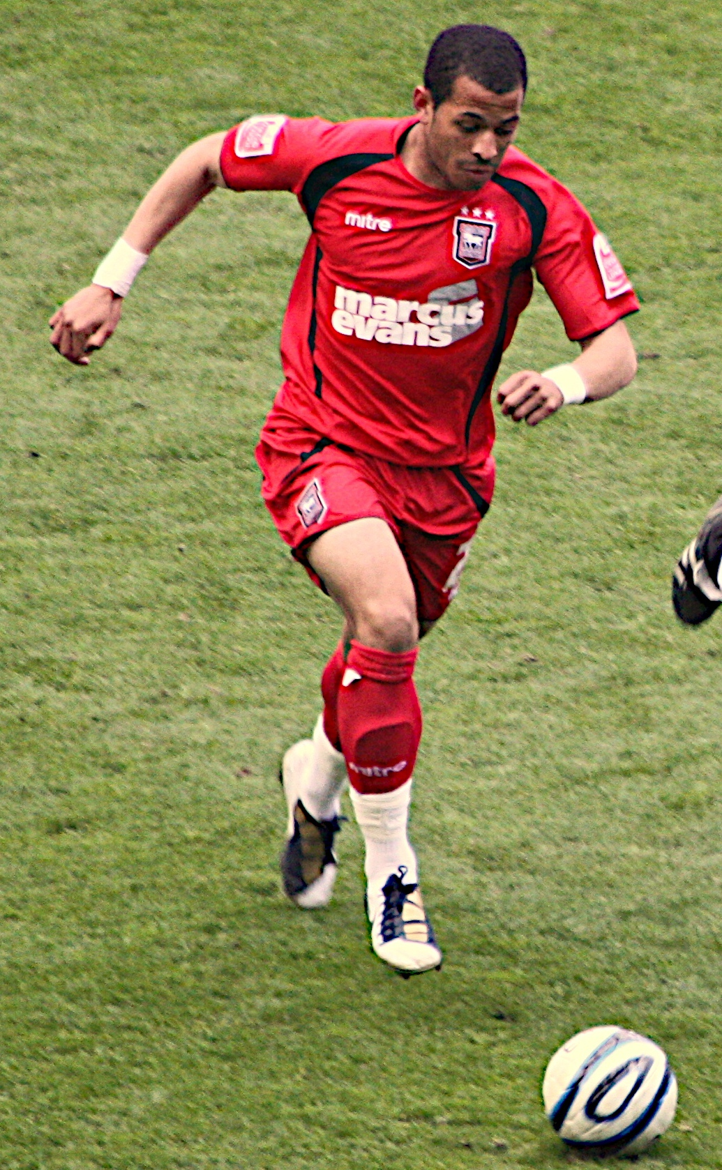 Carlos Edwards AND Jose Enrique